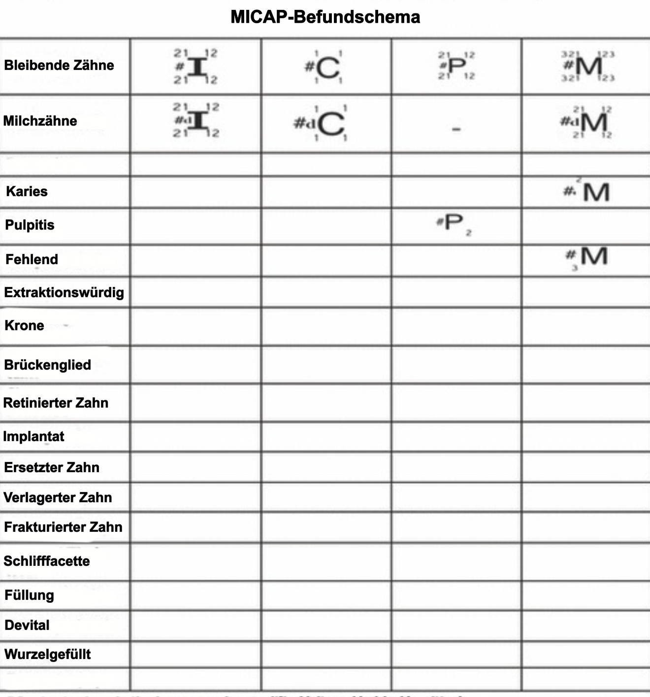 MICAP-Befundschema